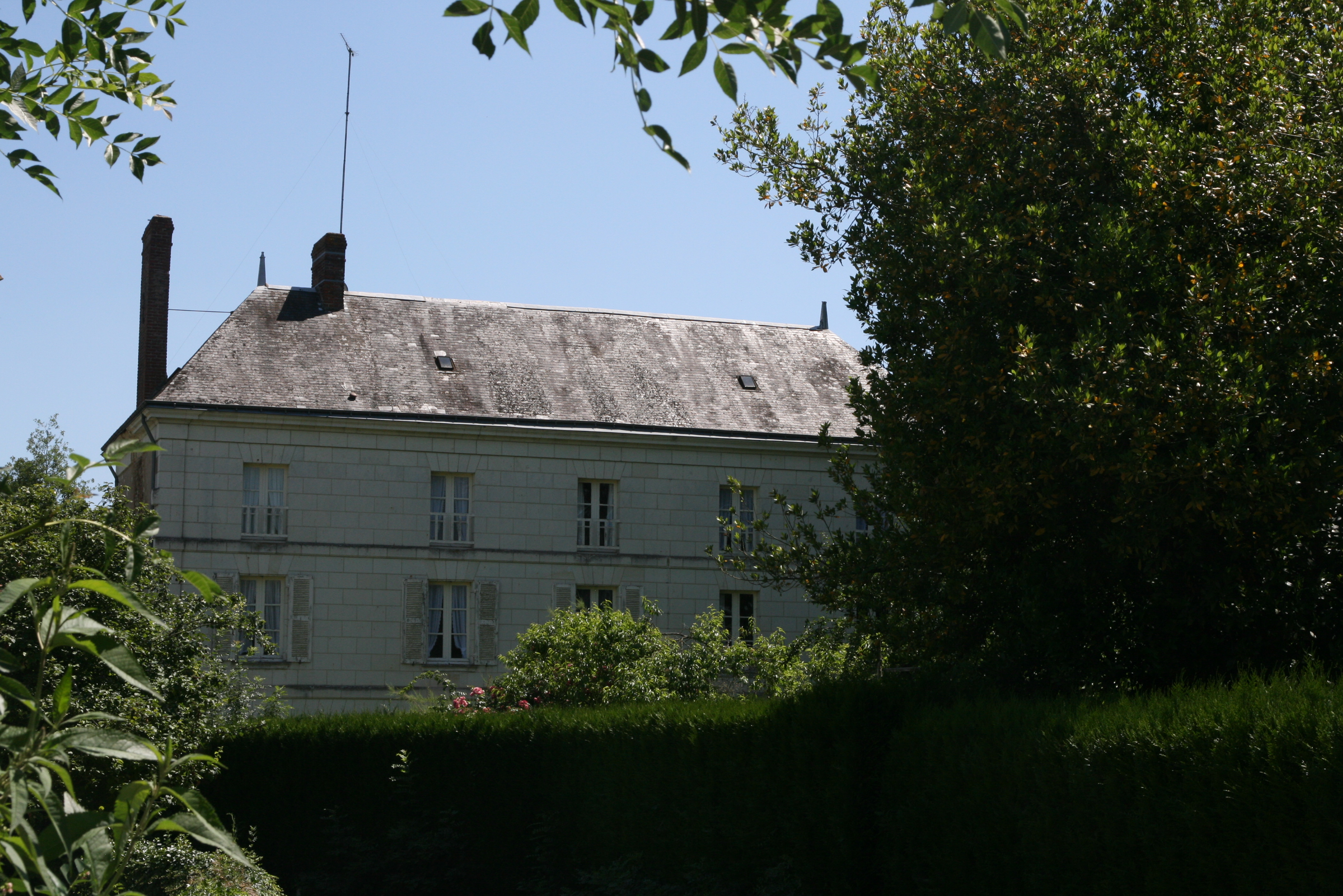 Le Moulin Charreau à Villeloin-Coulangé. Ancien moulin à eau.